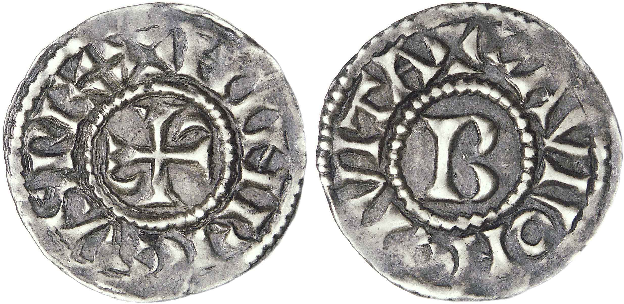 Nom de l'atelier/ville : Chalon-sur-Saône Métal : argent Diamètre : 20mm Axe des coins : 5h. Poids : 1,29g. Degré de rareté : R2 Titulature avers : + HINRICVS REX. Description avers : Croix doublement chrismée. Traduction avers : (Henri roi). Titulature revers : + CAVIION CIVITA. Description revers : Grand B dans le champ. Traduction revers : (Cité de Chalon).